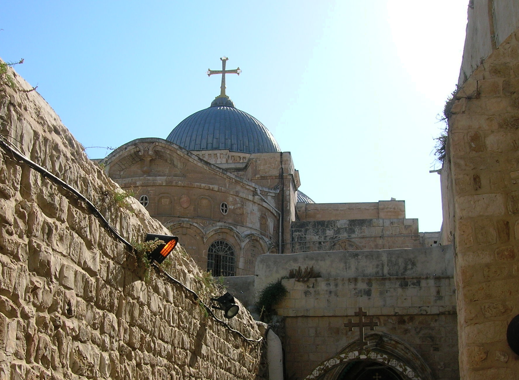 Blick auf die Grabeskirche, Jerusalem, vom Dach her